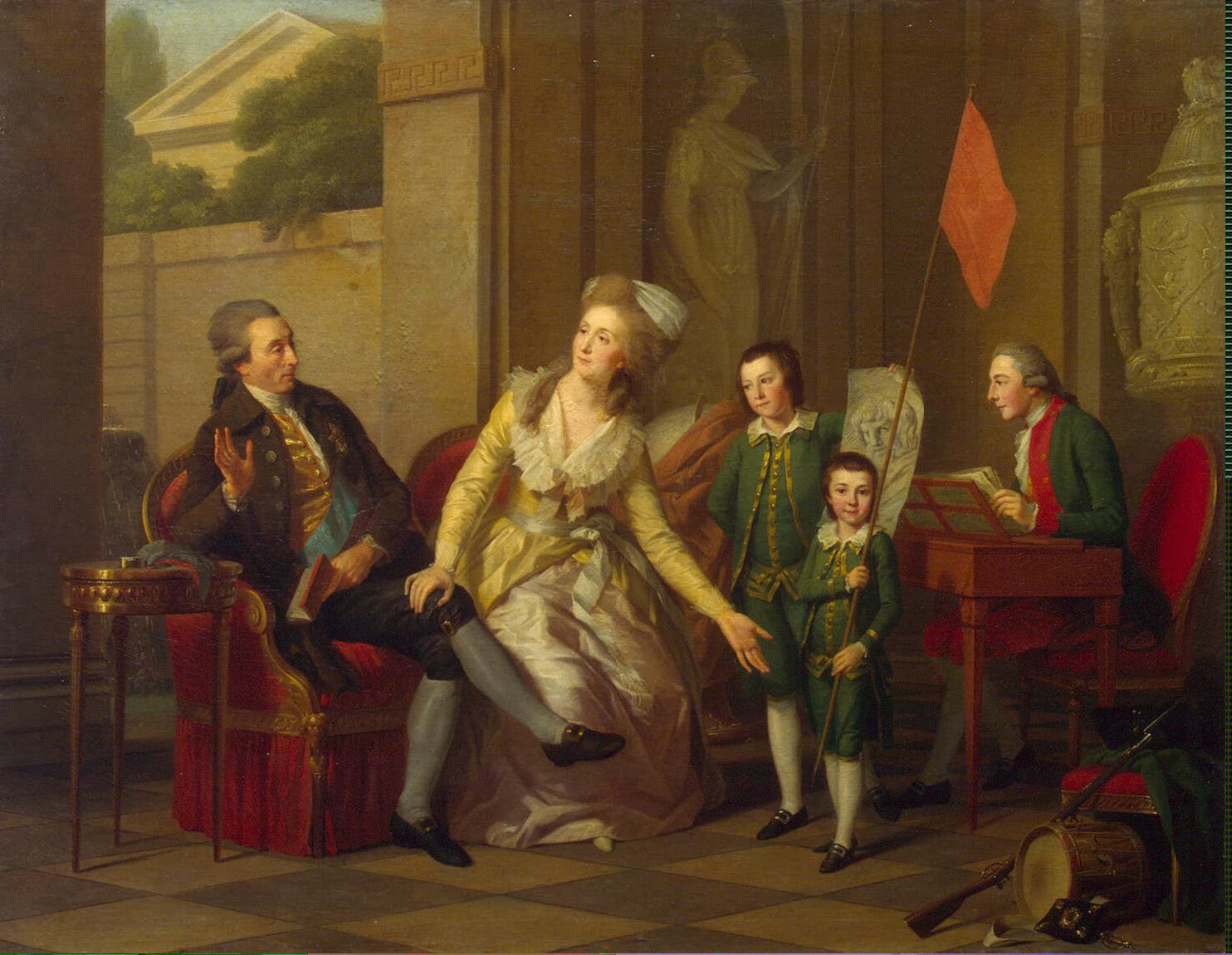 Князь Николай Иванович Салтыков (1736-1816) с женой Натальей Владимировной (1737-1812), ур.Долгоруковой, и их сыновья: Дмитрий (1767-1826), Александр (1775-1837) и Сергей (1777-1828).